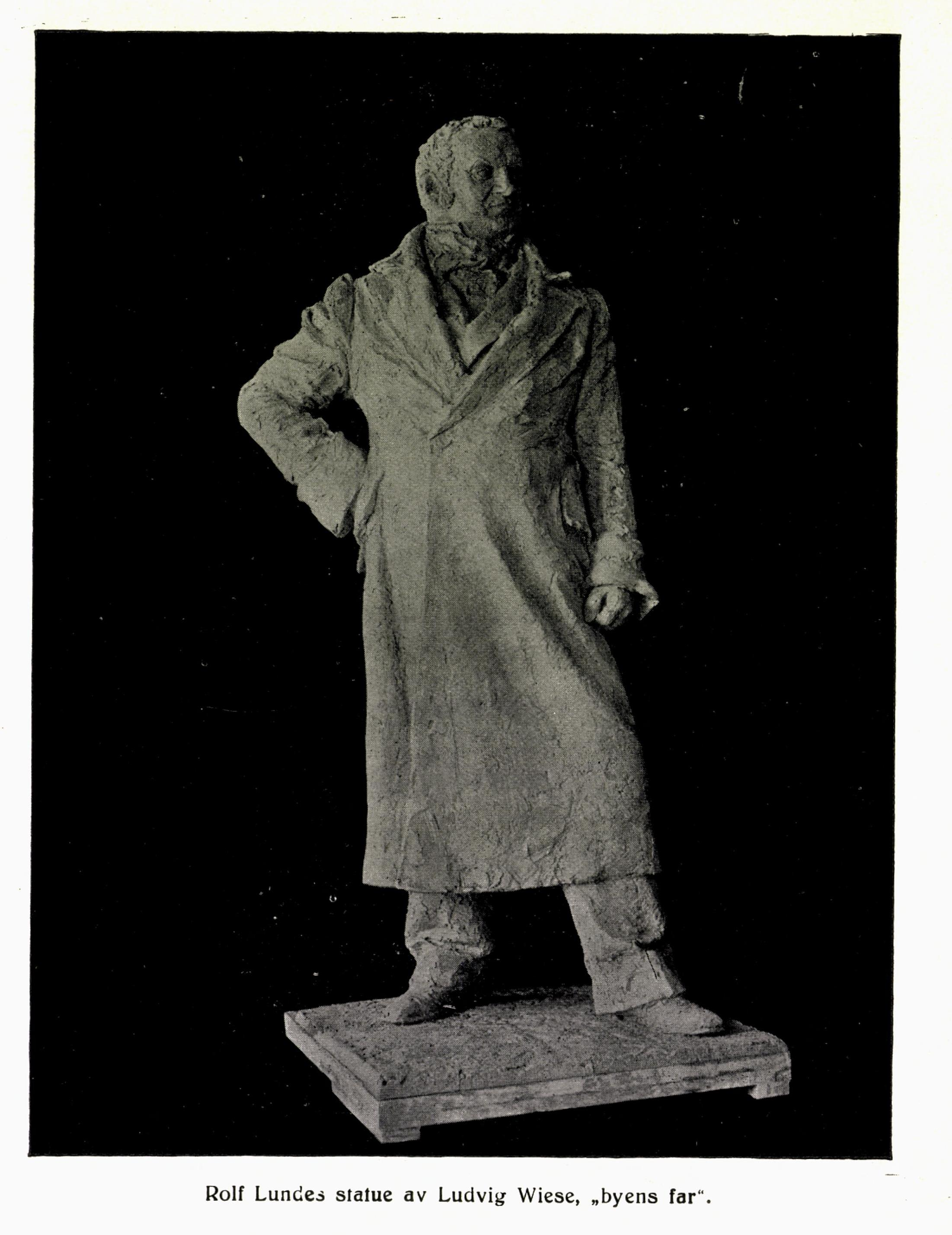 Illustrasjon hentet fra boken "Lillehammer 1827-1927" av og utgitt av (Lillehammer, 1927)